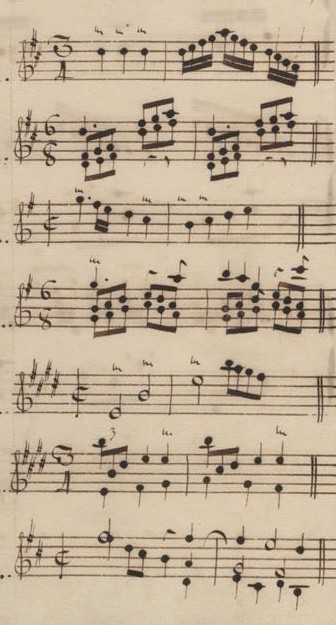 Table du volume XII des manuscrits de Venise (incipit des sonates 8 à 14, K. K. 491 à 497).